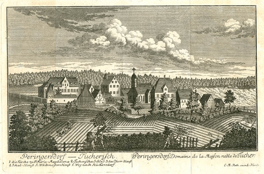 Peringersdorf - Tucherisch, Kupferradierung, um 1759